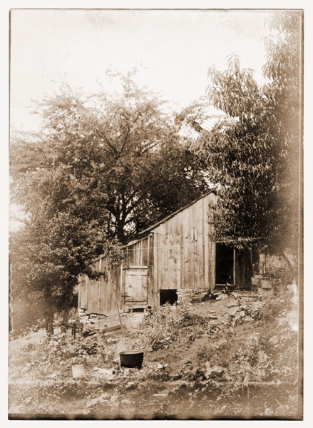 August Fendlers Haus in Allentown (Missouri, USA) Sonstiges: ...